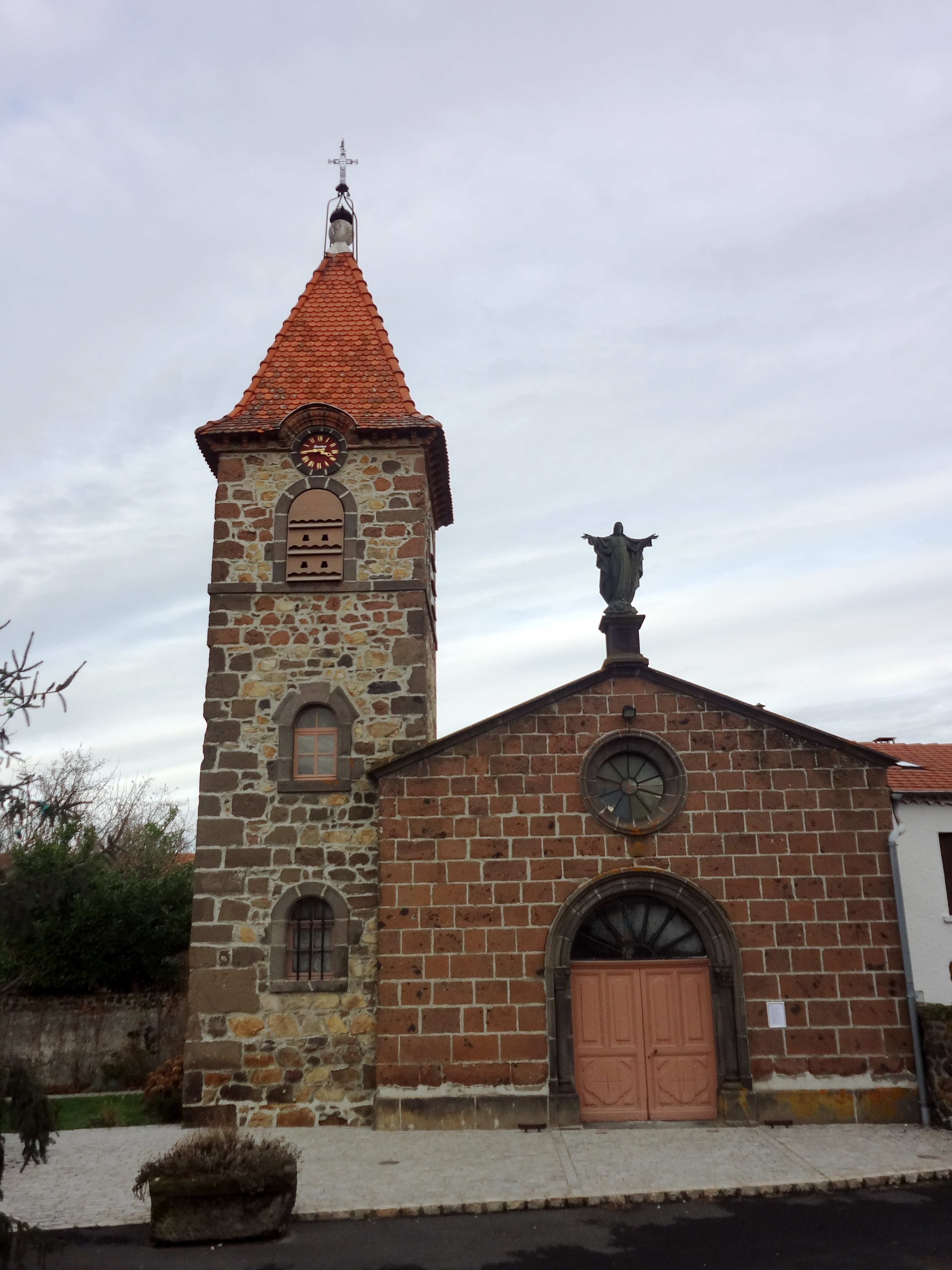 La Chomette, façade de l’église